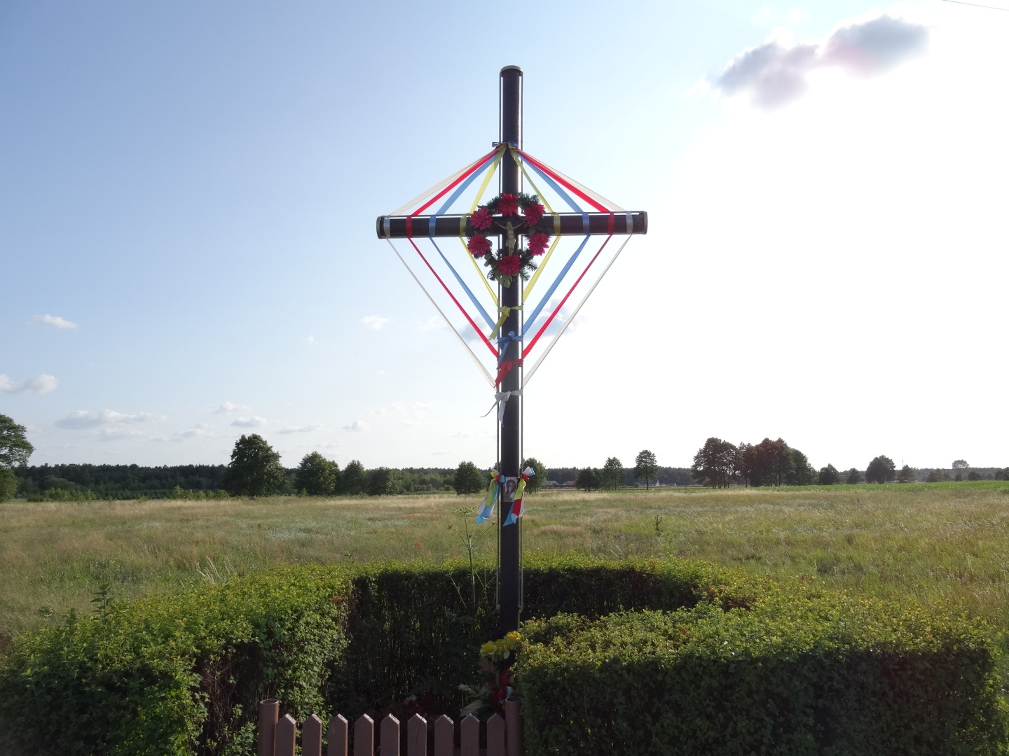 Krzyż przydrożny w Dobromierzu, gmina Nowa Wieś Wielka, powiat bydgoski